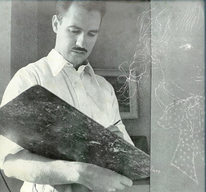 Manuel Zorrilla